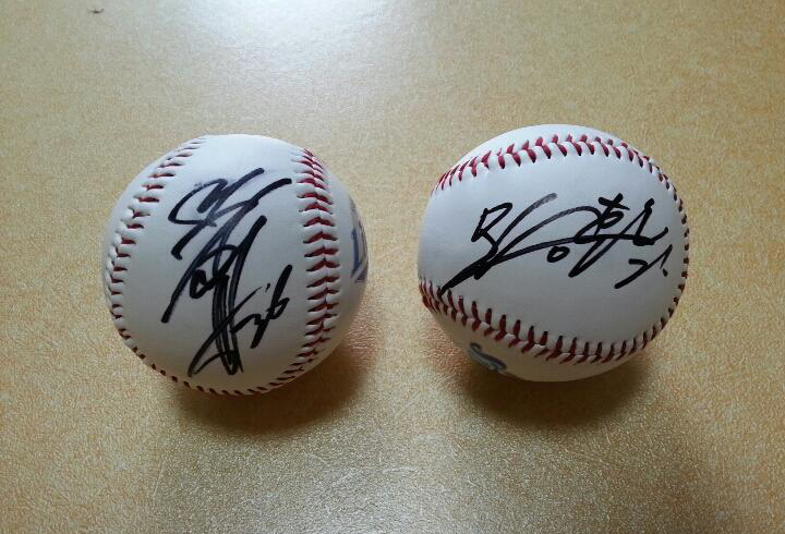 삼성 라이온스 오승환, 야구 싸인 볼